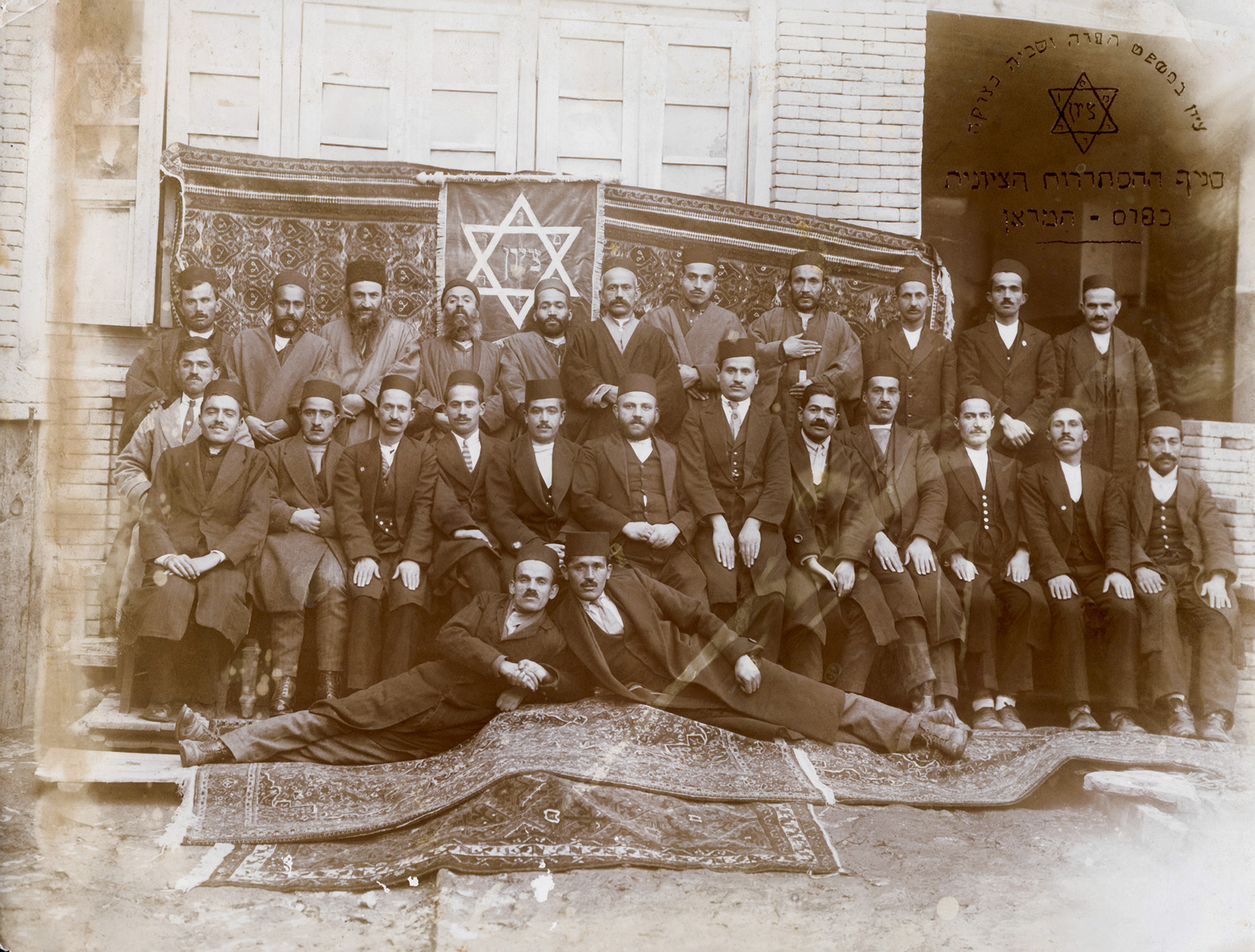 Zionist Federation in Iran gathering 1920